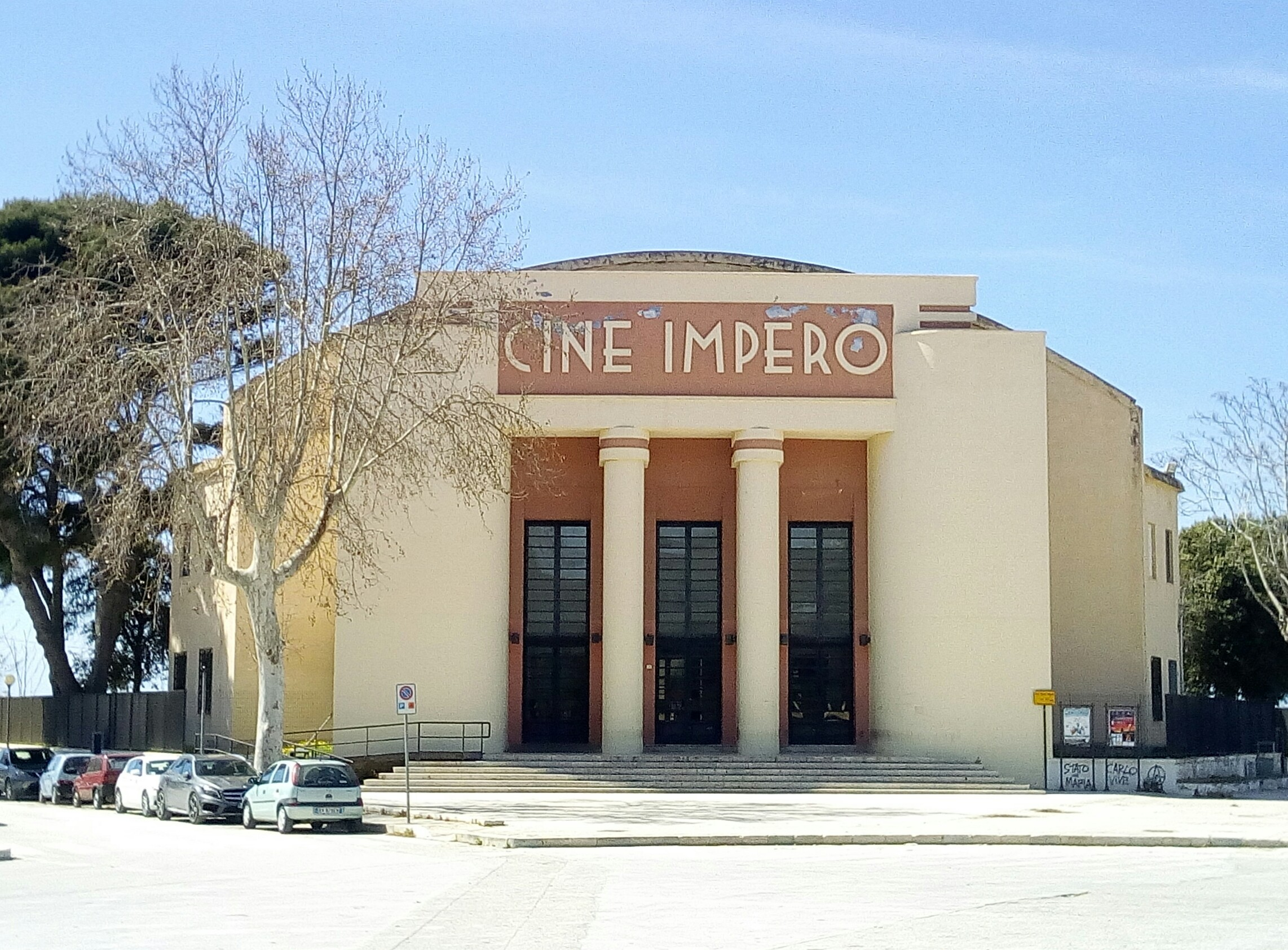 Il cineteatro Impero di Marsala, costruito negli anni '30